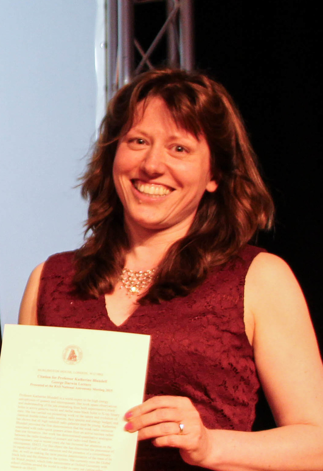 Katherine Blundell